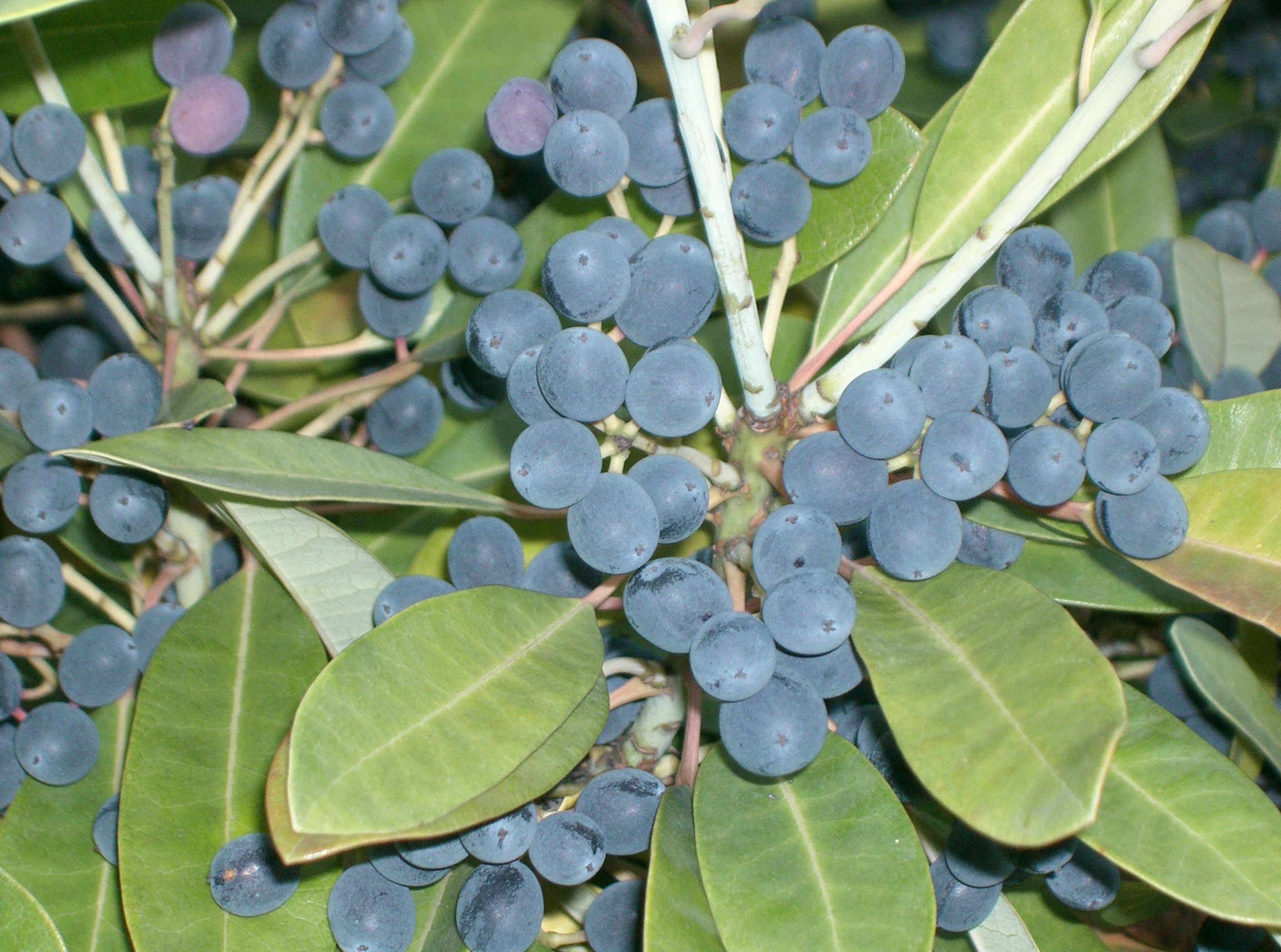 Daphniphyllum teijsmannii(=D. amamiense=D. glaucescens subsp. teijsmannii)